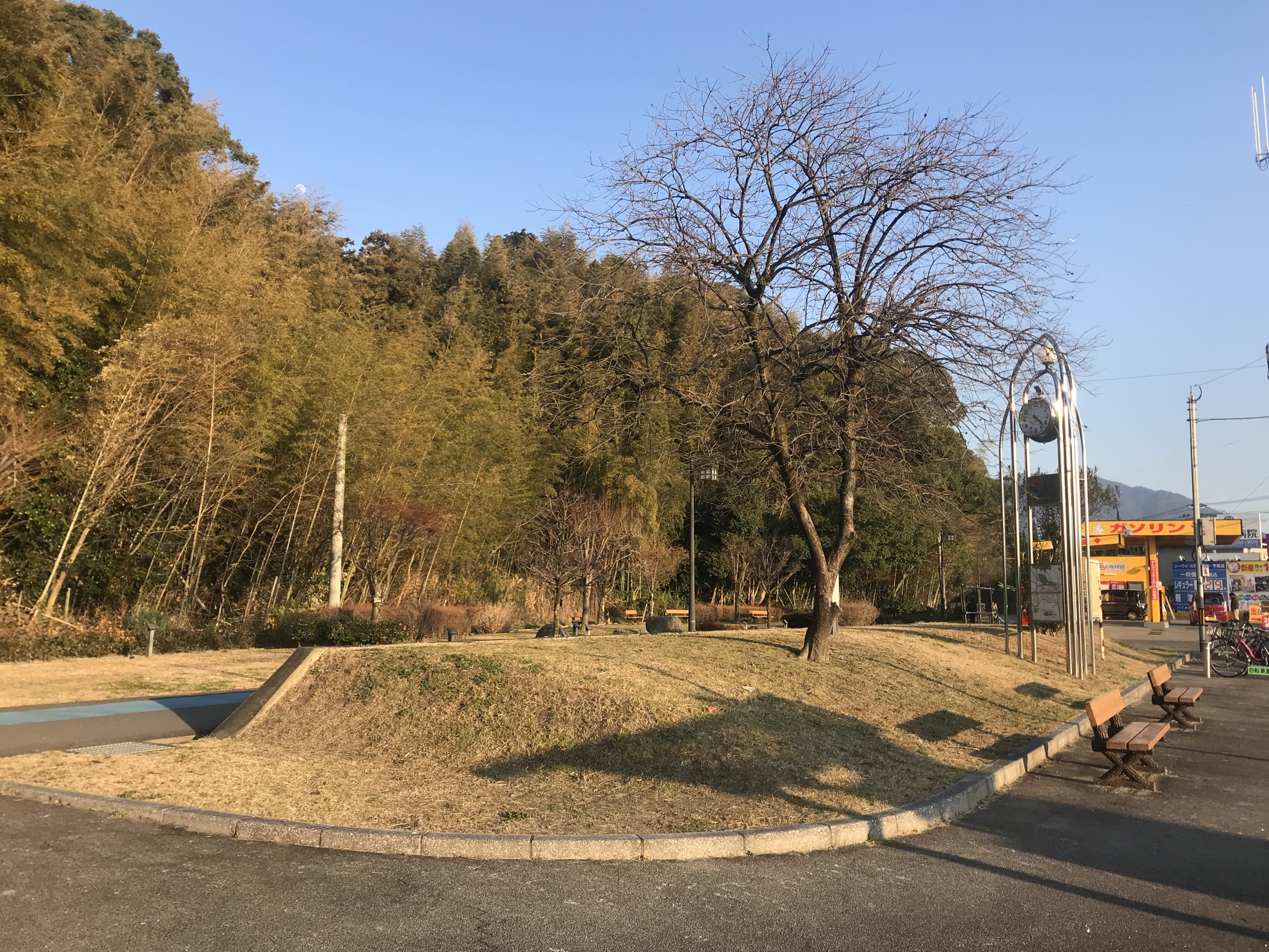 旧・下宇美駅のホーム跡